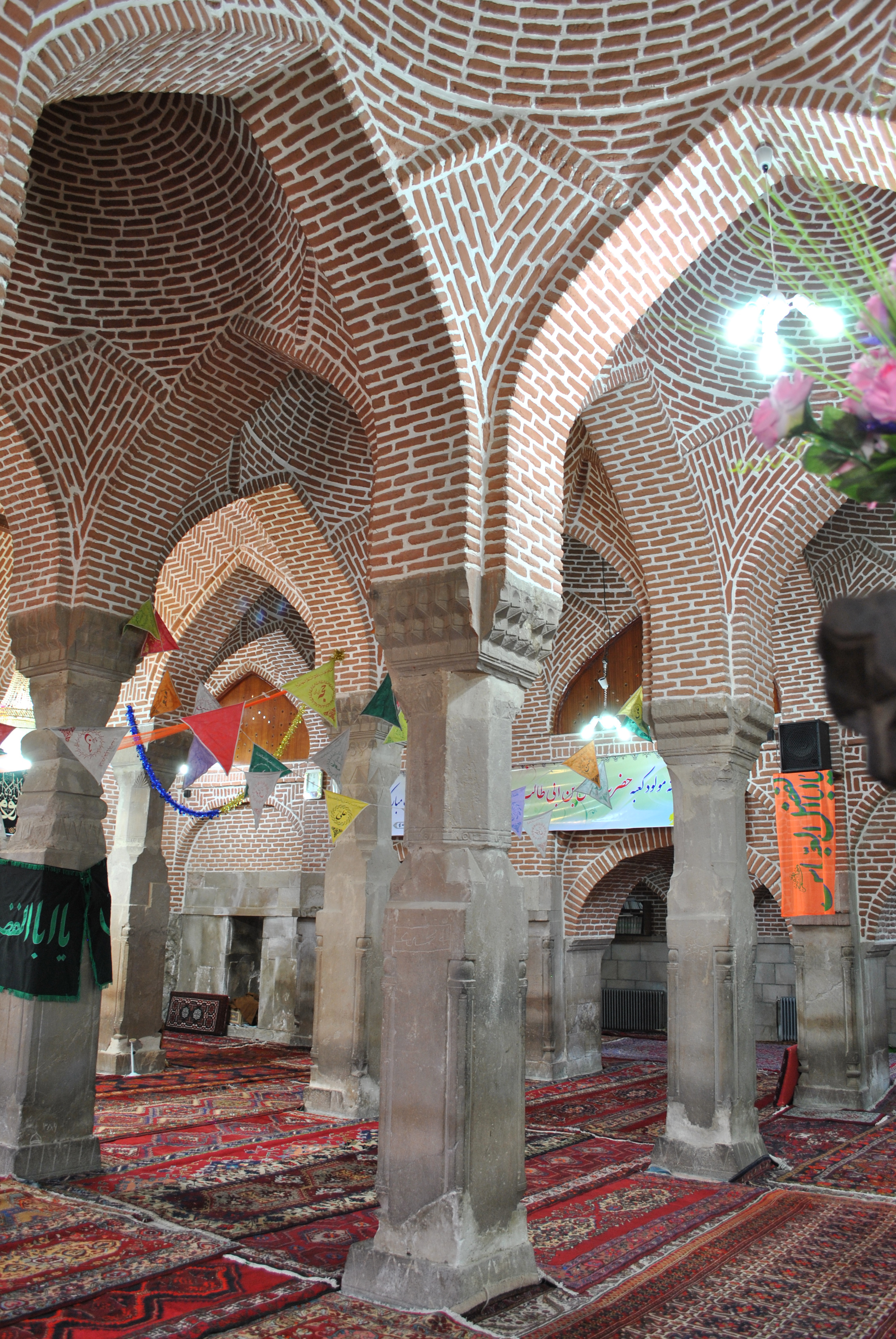 مسجد جامع قریه ترک بالا